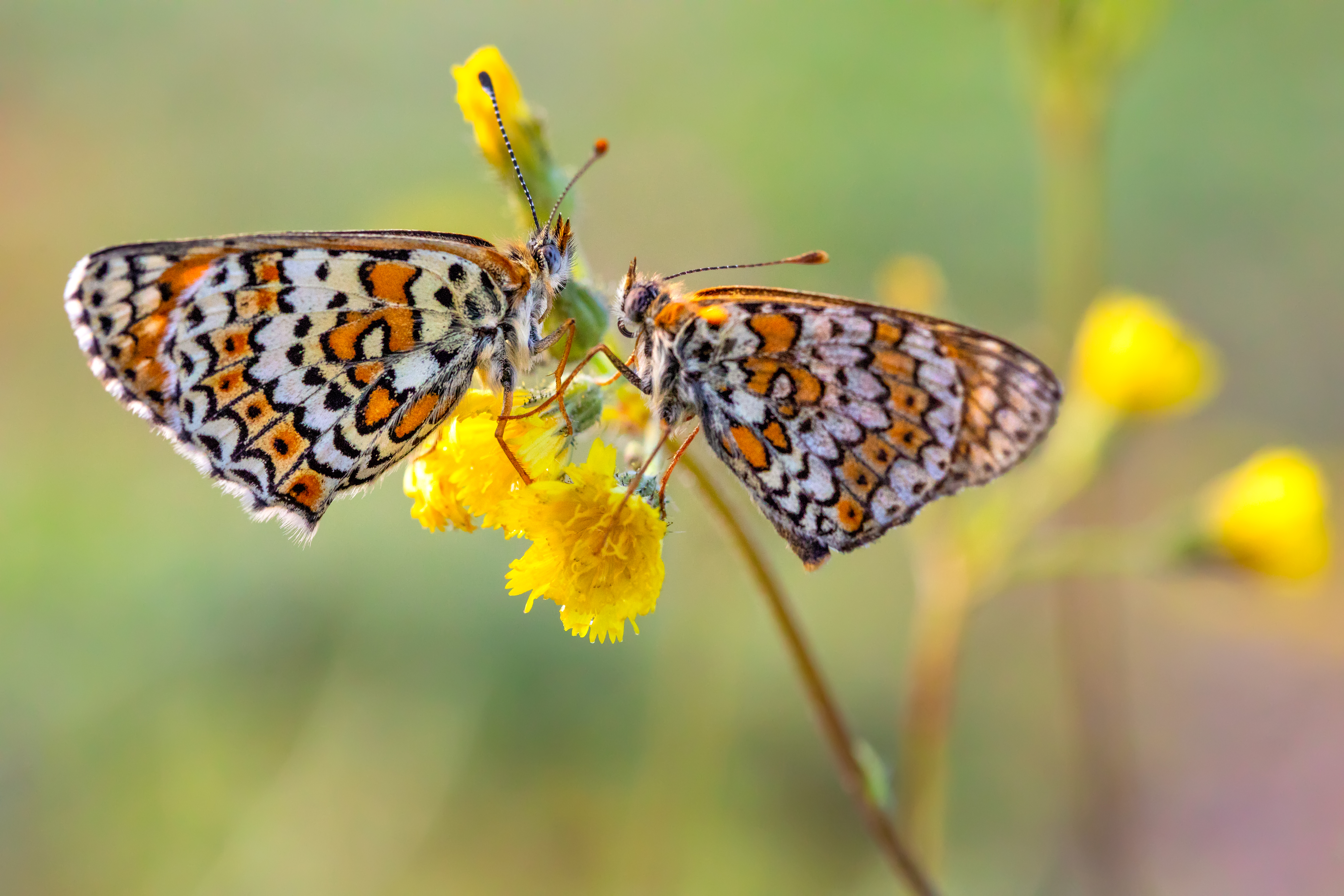 Στην περιοχή του Ταξιάρχη Χαλκιδικής, πέτυχα αυτές τις δύο πεταλούδες να μοιράζονται το ίδιο λουλούδι και να "κρατάει" η μία το "χέρι" της άλλης. Λήψη με macro 100mm φακό Canon. This is a photography of Natura 2000 protected area with ID GR1270012